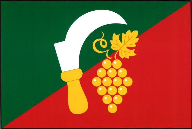 Kudlovice vlajka